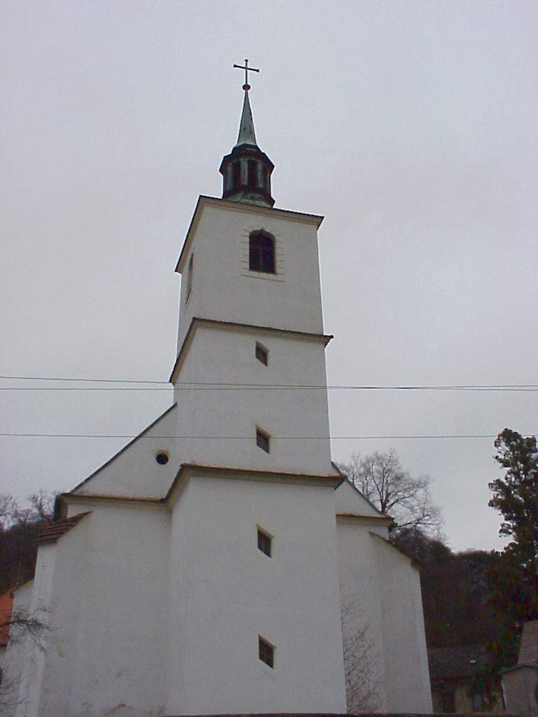 church in Svádov